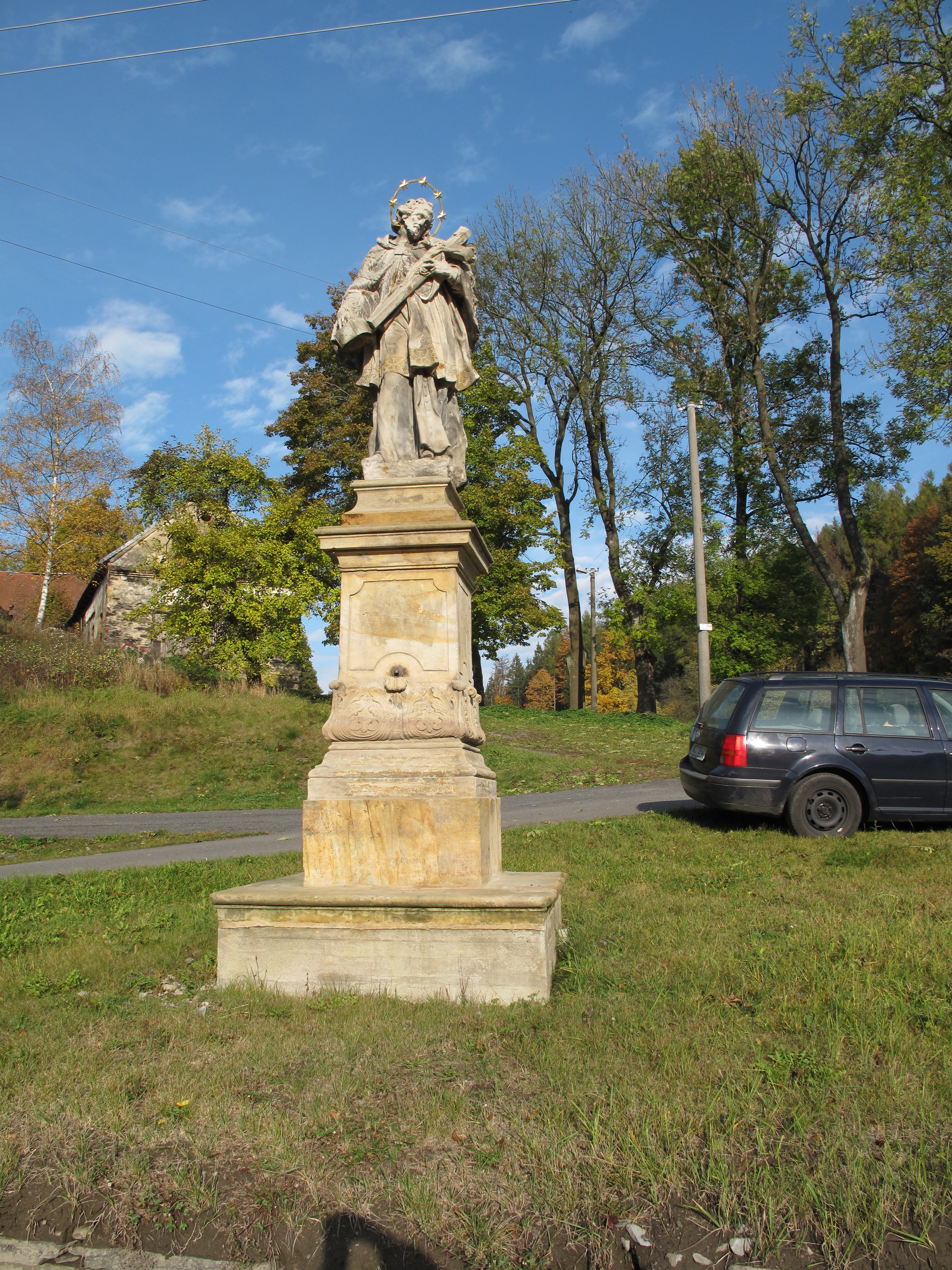 Norberčany. Okres Olomouc, Česká republika.